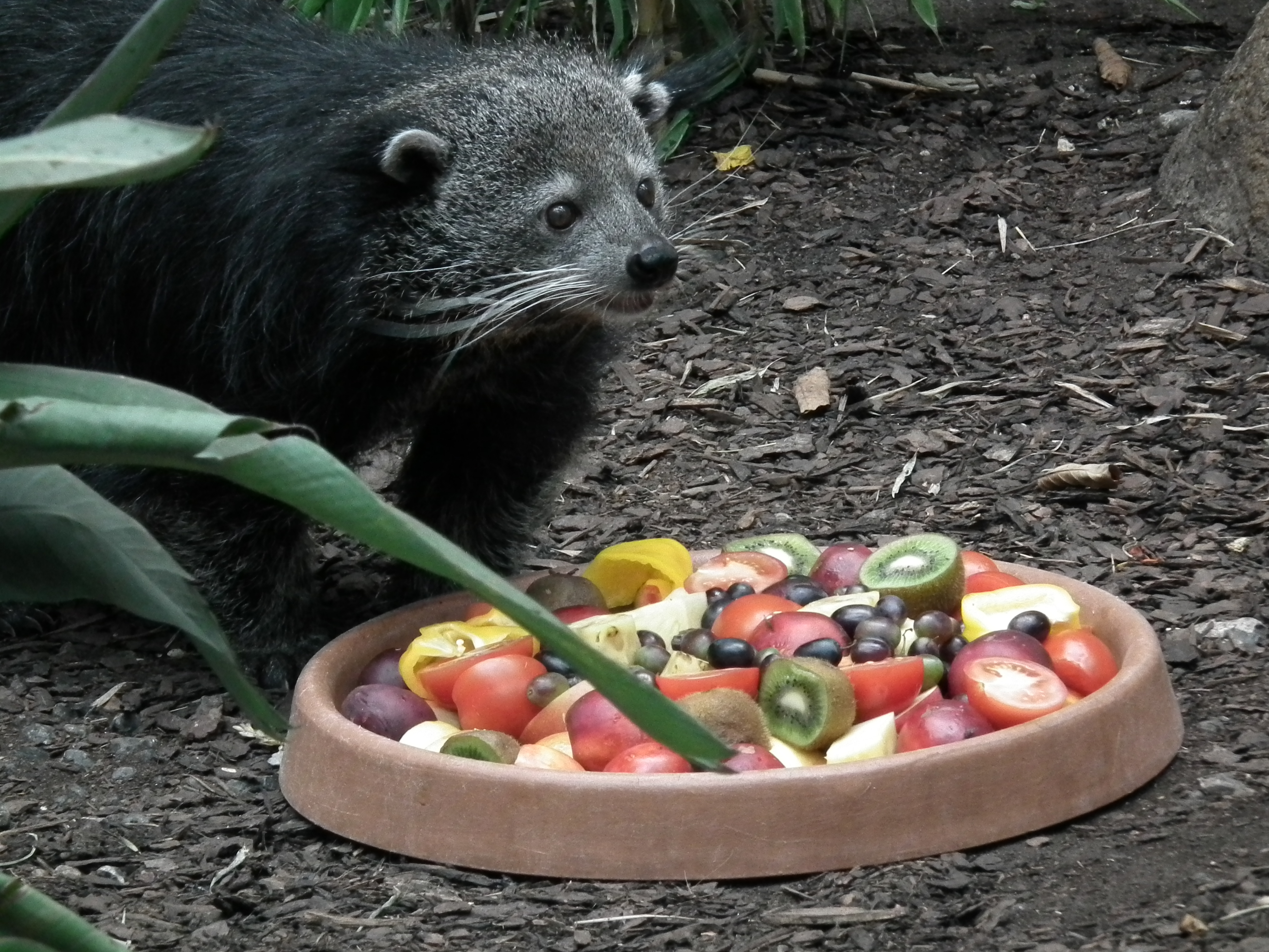 Binturong (Arctictis binturong) im Vivarium Darmstadt (Hessen, Deutschland)